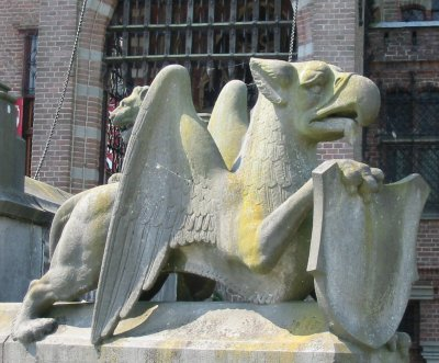 Griffioen, Kasteel de Haar, foto gemaakt en ter beschikking gesteld voor vrij gebruik door